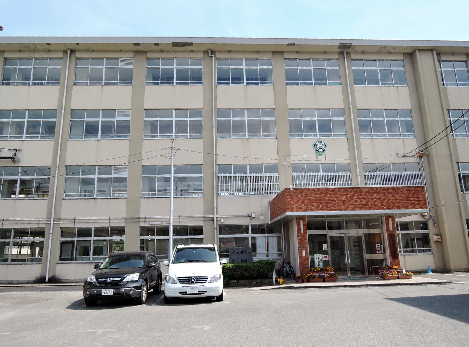 福岡市南区の福岡市立西高宮小学校